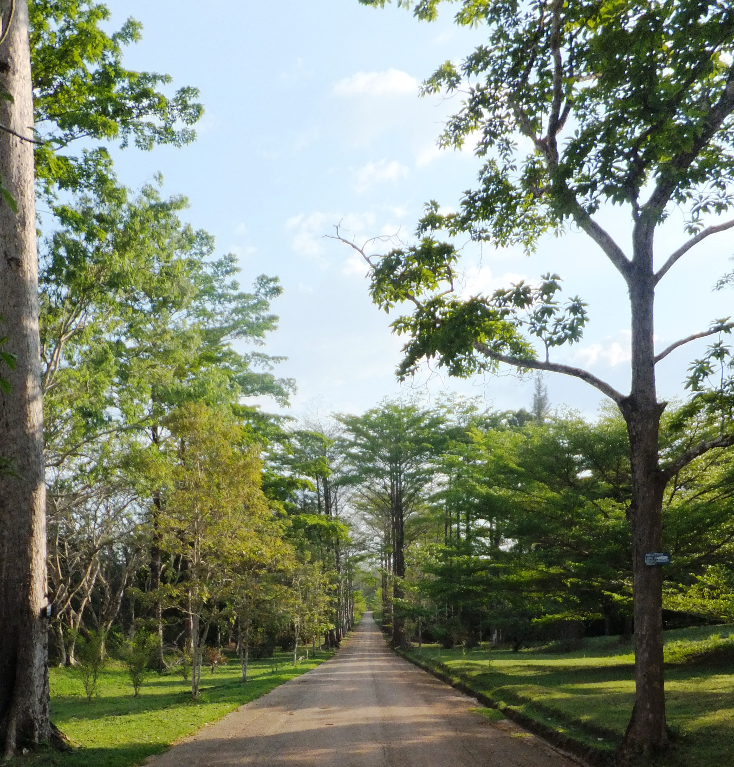 Entrée du jardin du père Gillet à Kisantu, Bas-Congo